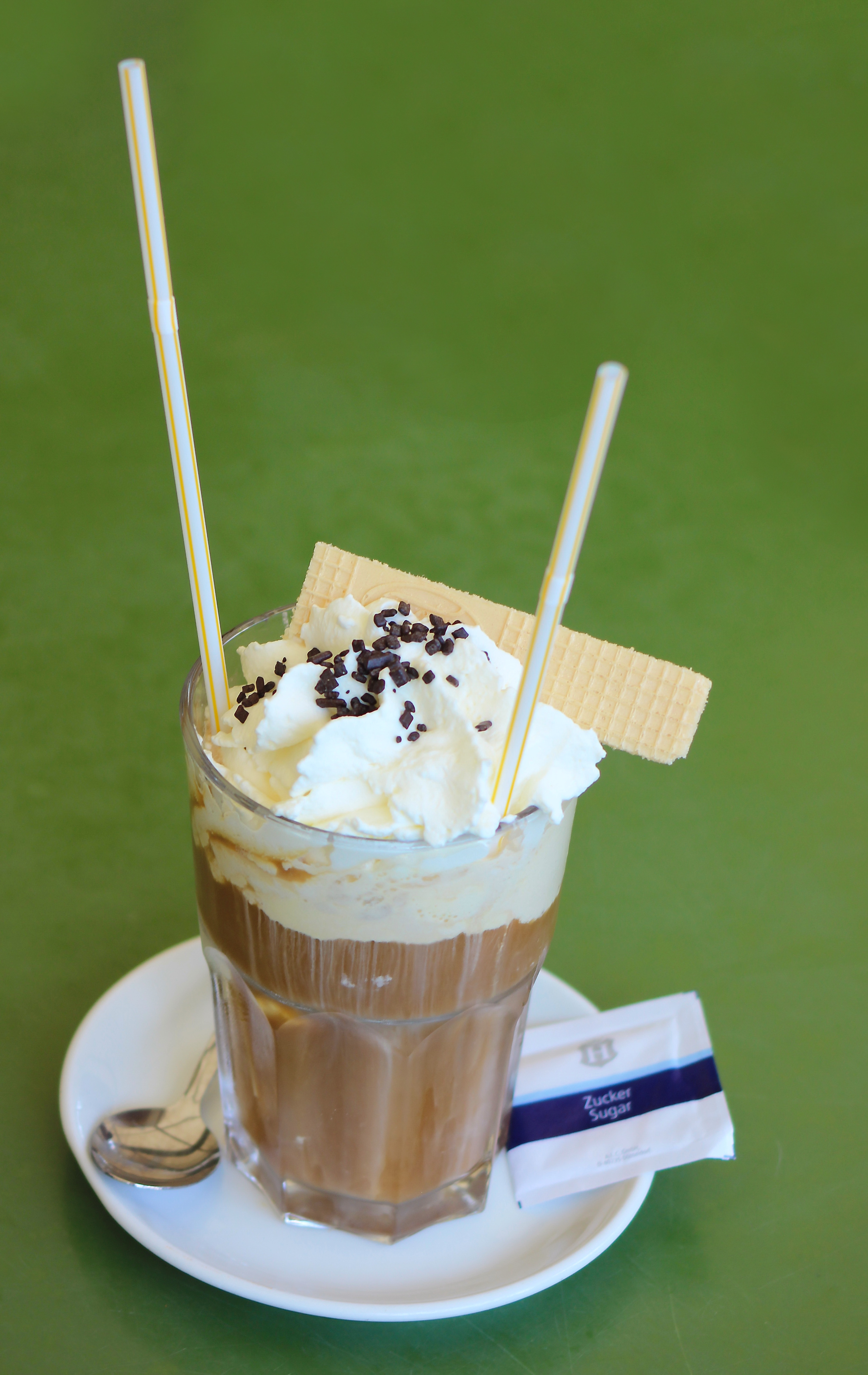 Eiscaffe im Glas mit Schlagsahne